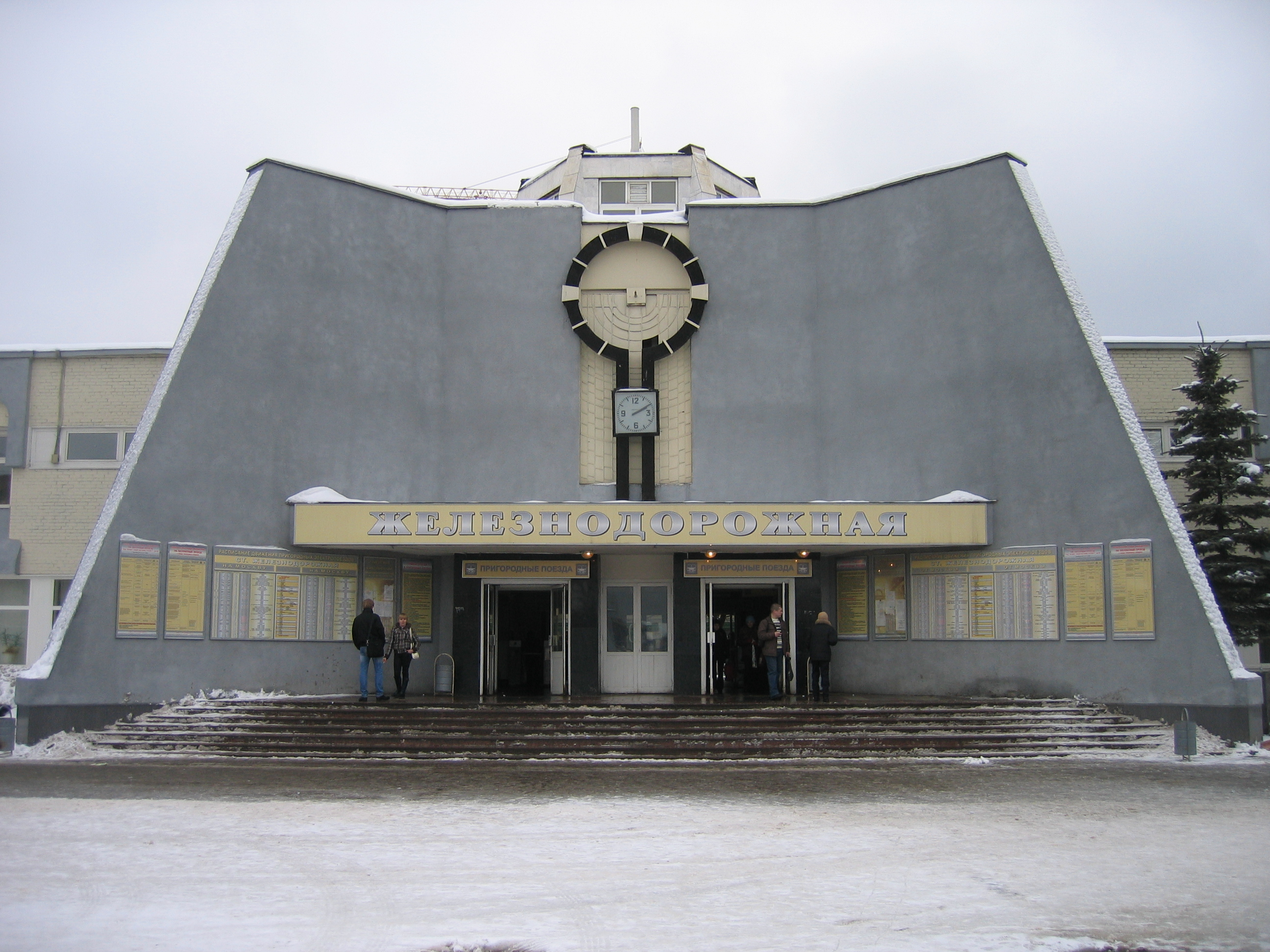 Железнодорожная станция в г.Железнодорожный Московской области